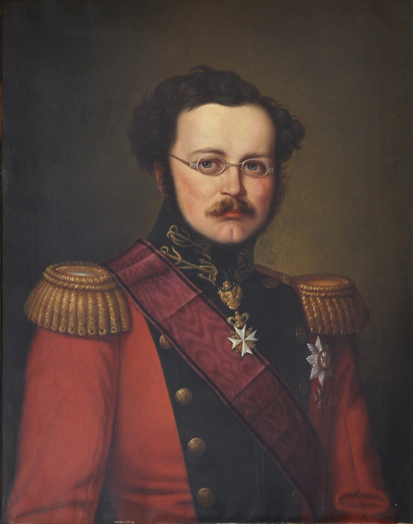 Burg Waldburg (Württemberg), Friedrich Fürst zu Waldburg-Wolfegg und Waldsee (1808-1871)